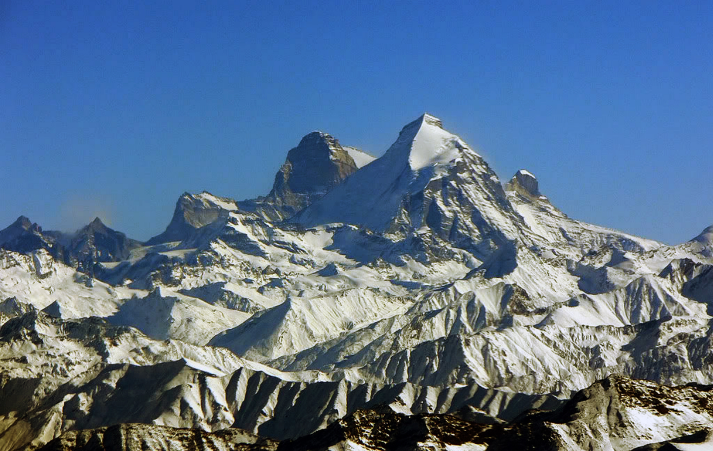 Am Flug von New Delhi, Flughöhe 20.000 Fuß, kurz vor der Landung in Srinagar. An der rechten Tragfläche gleitet das Nun-Kun-Massiv vorüber. © 1979 Österreichische Ladakh Himalaya Expedition 1979, Gabriele Binder, Wolfgang Ott